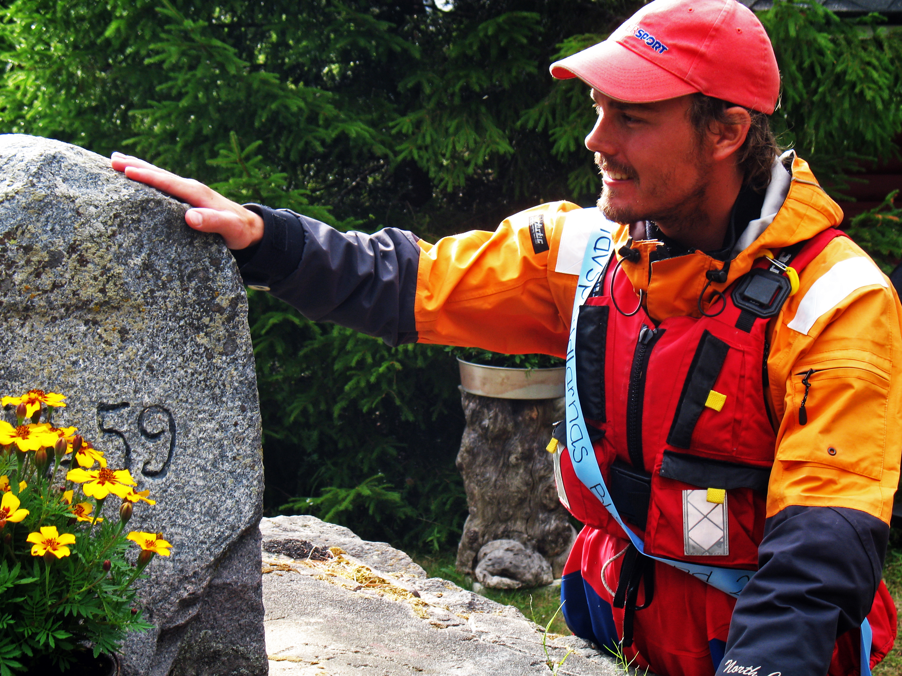 Haparanda, målgång Havspaddlarnas Blå Band vid Riksröse 59.